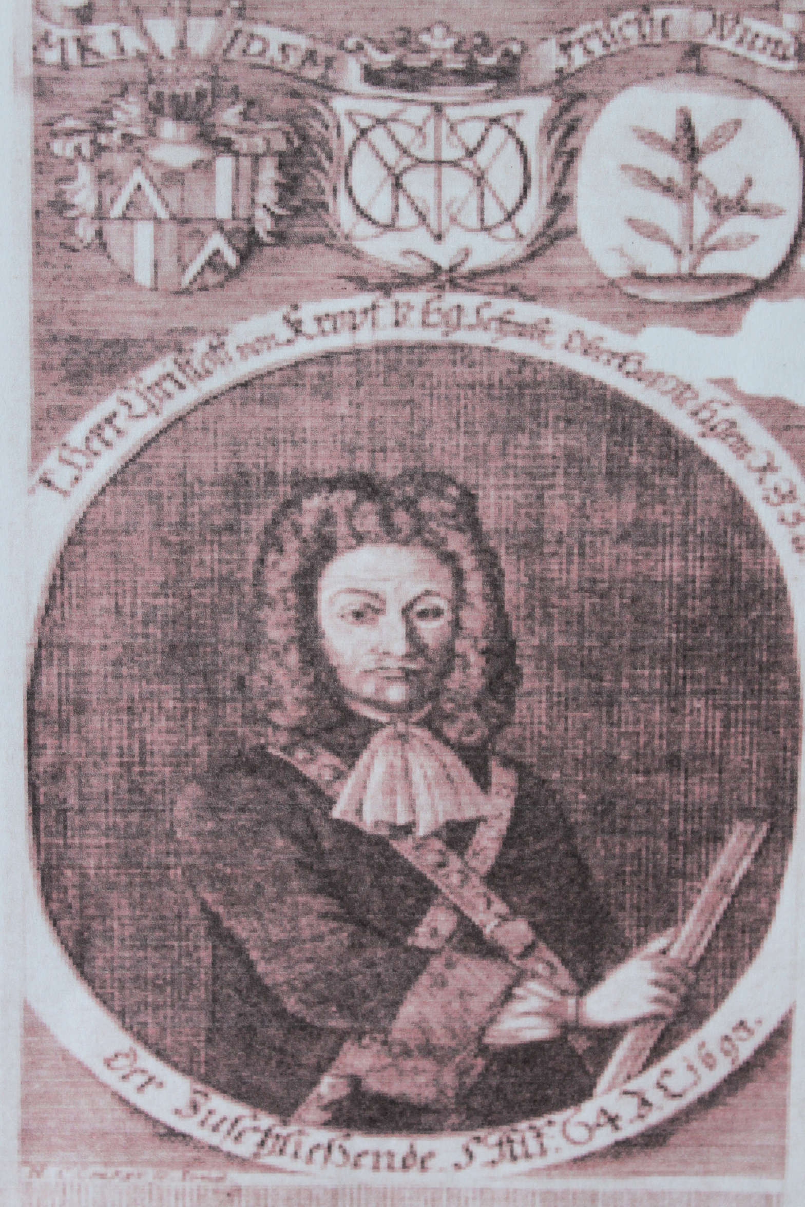 Portrait des Christoph Sigismund von Kropff um 1656